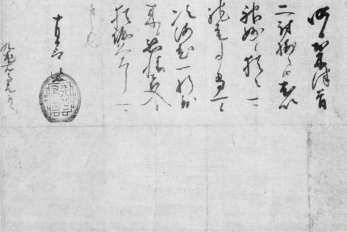 織田信長黒印状